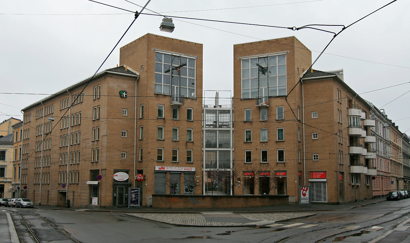 Pilestredet 53, Oslo. Bygd 1988; 4 B Arkitekter.